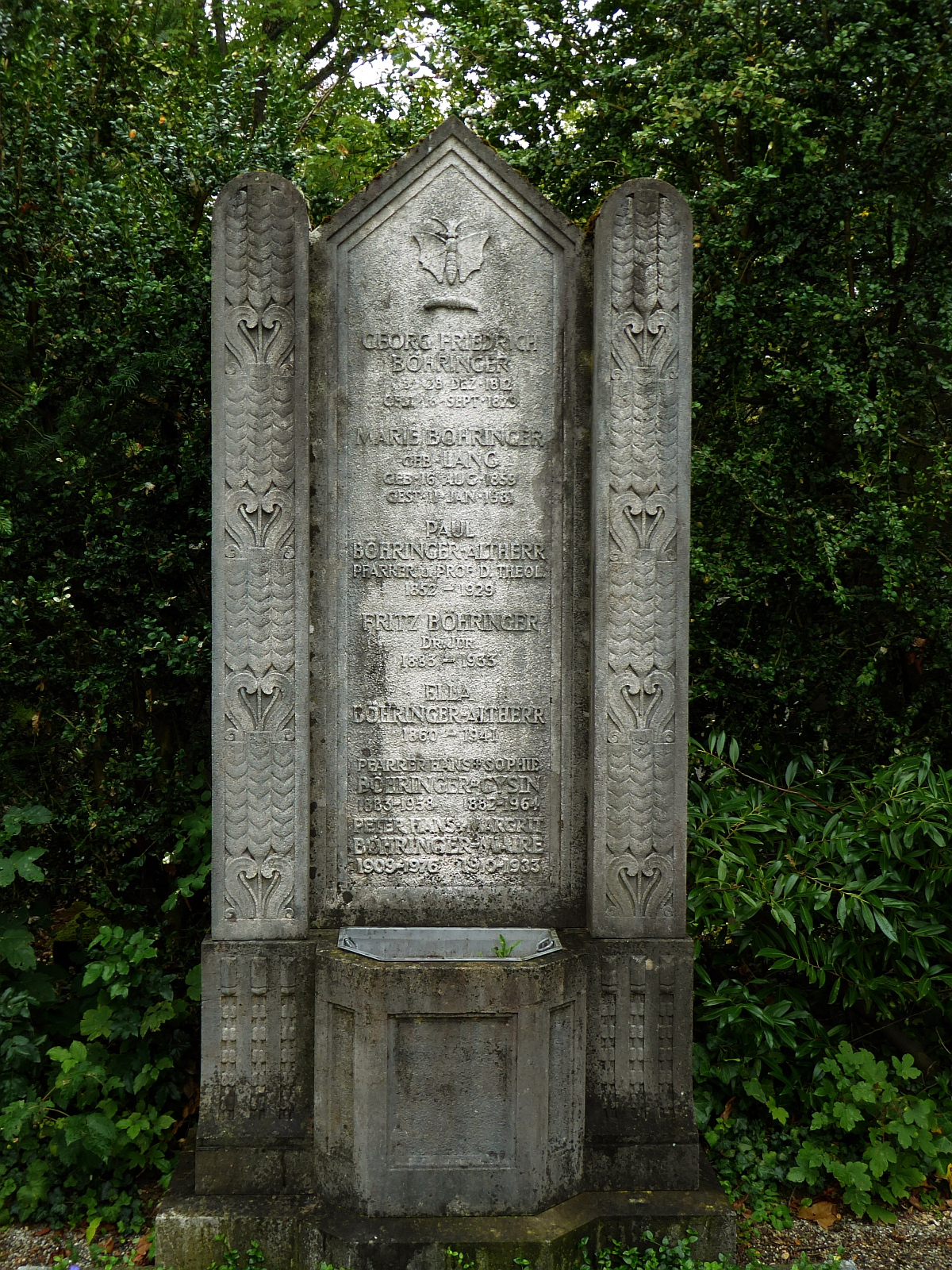 Paul Böhringer (1852–1879) Pfarrer, Professor der Theologie, Grabstele auf dem Friedhof Wolfgottesacker